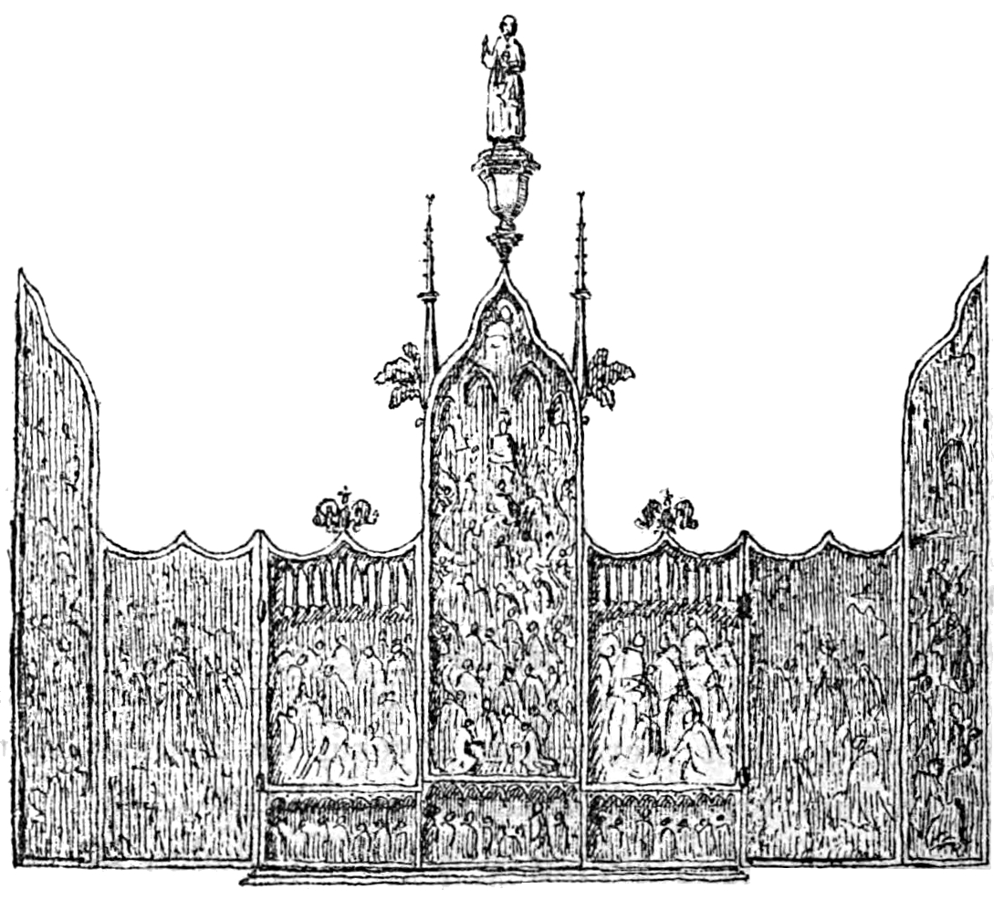 Altarskåp i Skärkinds kyrka. Teckning i "Utdrag af Antiqvitets-Intendenten P. A. Säves afgifna berättelse för år 1861", publicerad i Antiqvarisk tidskrift för Sverige band 1, 1864.